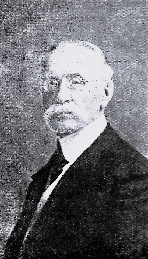 Direktor der Commerz-Bank a. D. Hermann Otte.